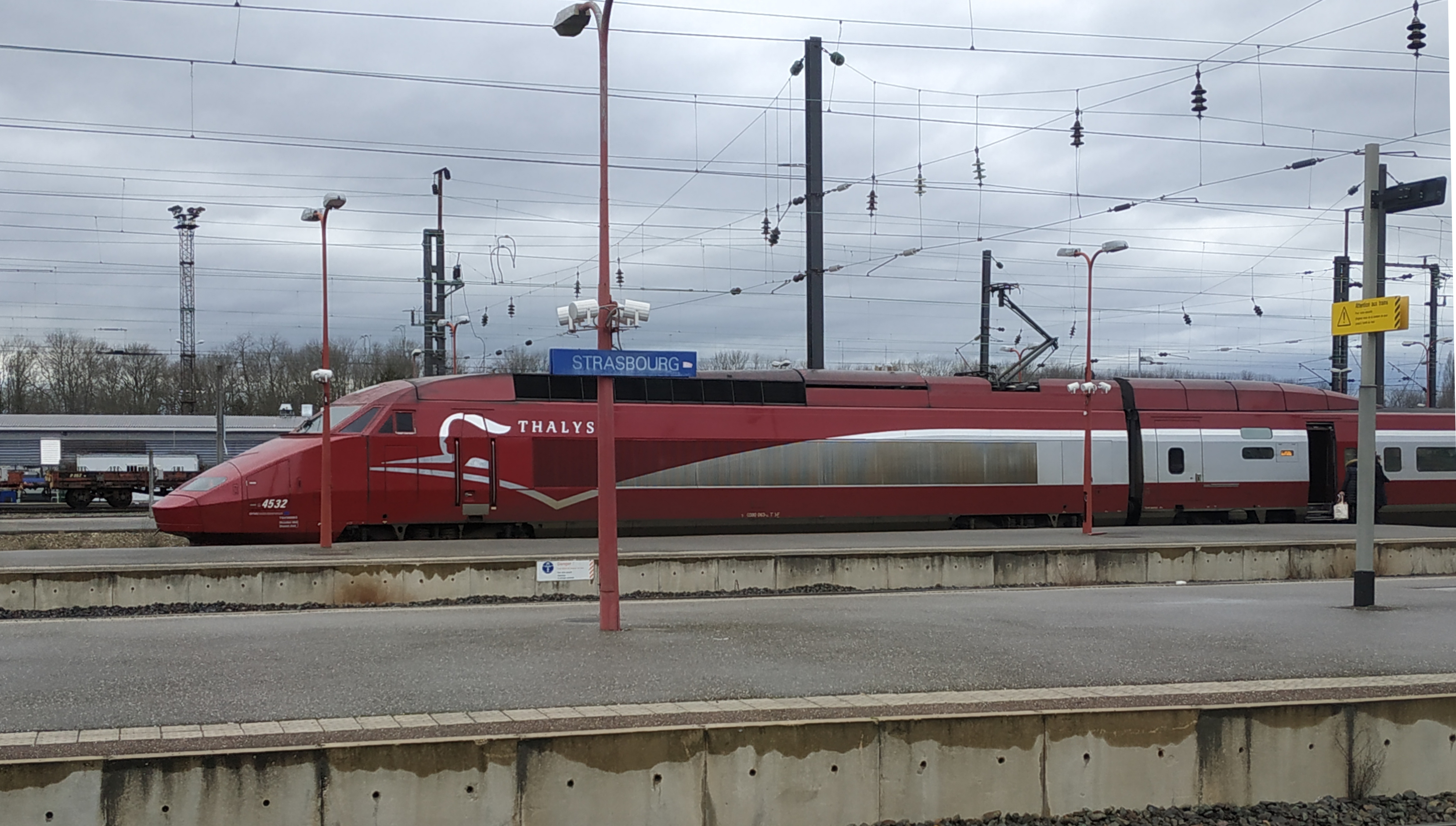 Thalys en gare de Strasbourg dans le cadre des liaisons entre les deux sites du parlement Européen (Bruxelles & Strasbourg)